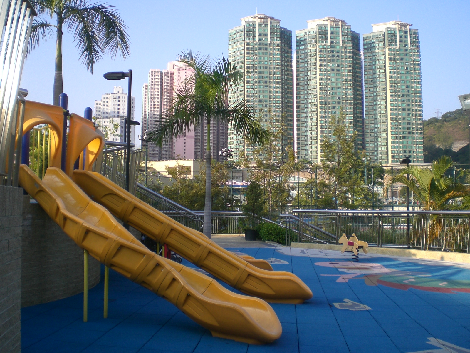 荔枝角公園遙望盈暉臺 Nob Hill